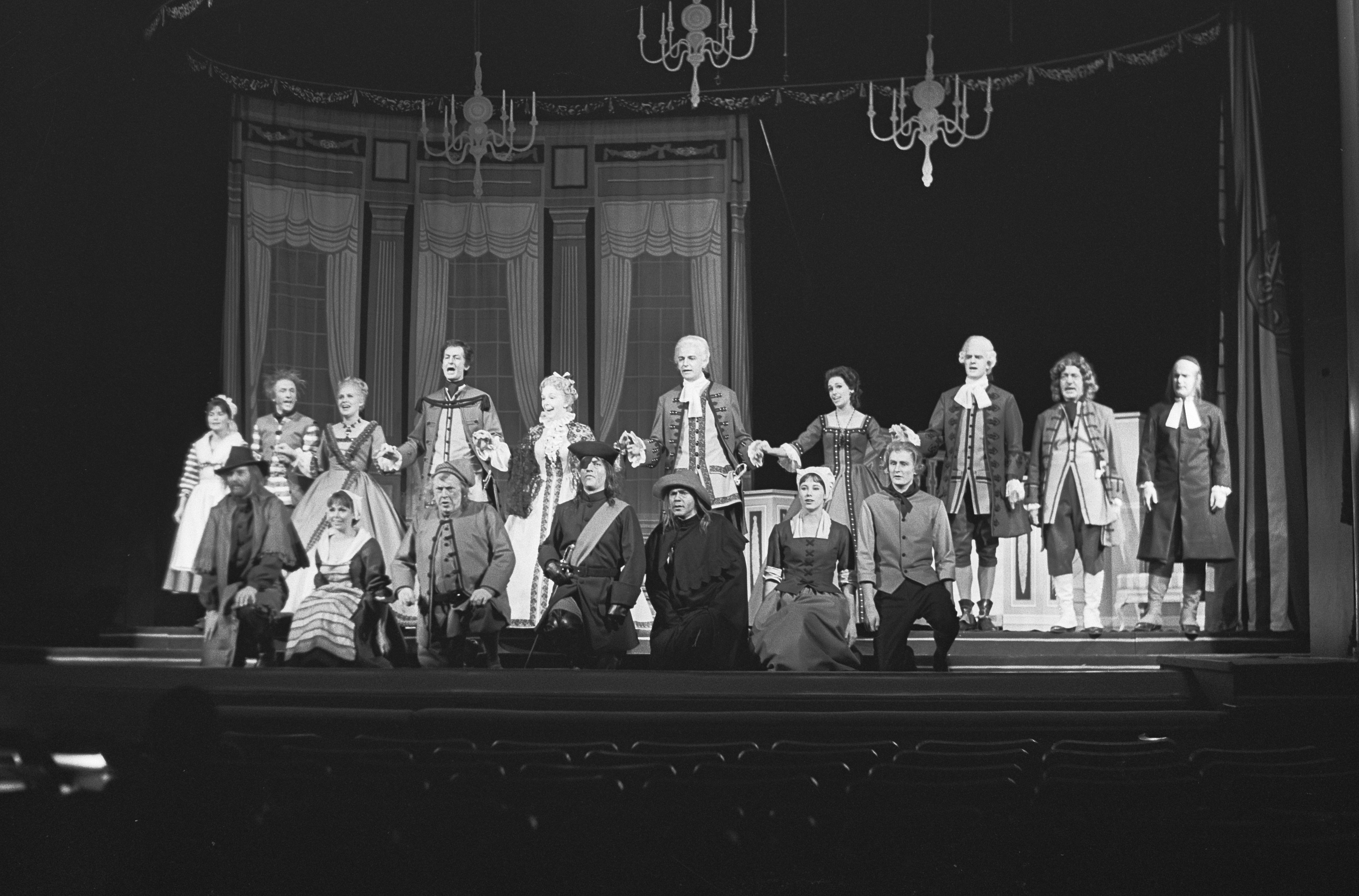 Collectie / Archief : Fotocollectie Anefo Reportage / Serie : [ onbekend ] Beschrijving : Nieuwjaarspremiere van Haagse Comedie , het stuk "Galante Listen" . Het gehele ensemble Datum : 30 december 1964 Trefwoorden : acteurs, actrices, toneel, toneelspelers Persoonsnaam : Haagse Comedie Fotograaf : Gelderen, Hugo van / Anefo Auteursrechthebbende : Nationaal Archief Materiaalsoort : Negatief (zwart/wit) Nummer archiefinventaris : bekijk toegang 2.24.01.05 Bestanddeelnummer : 917-2890